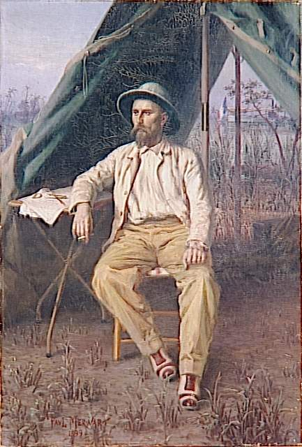 L'explorateur Gentil Emile (1866-1914)